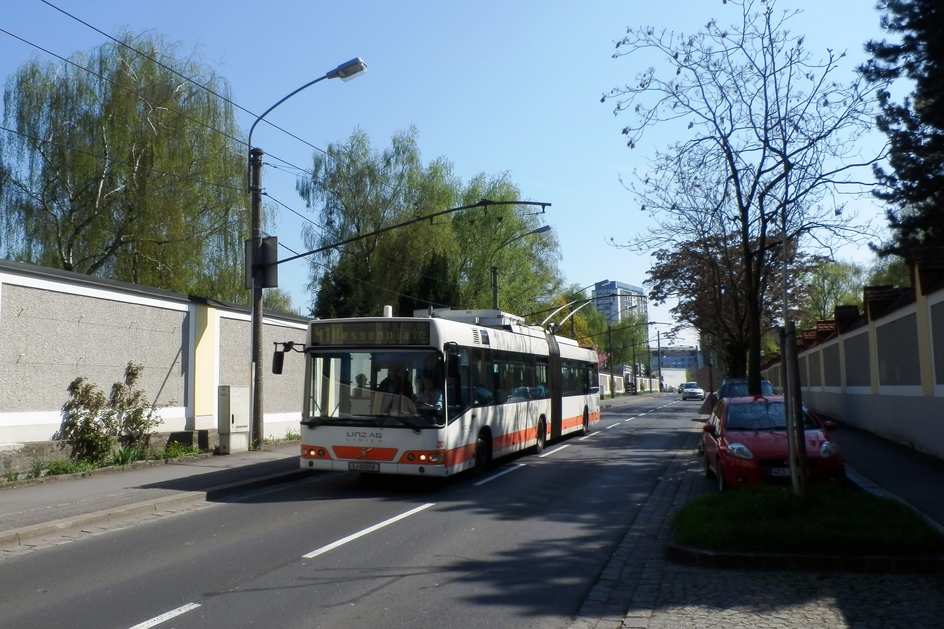 Linz AG Obus - Linie 41 in der Dinghoferstraße beim Barbarafriedhof